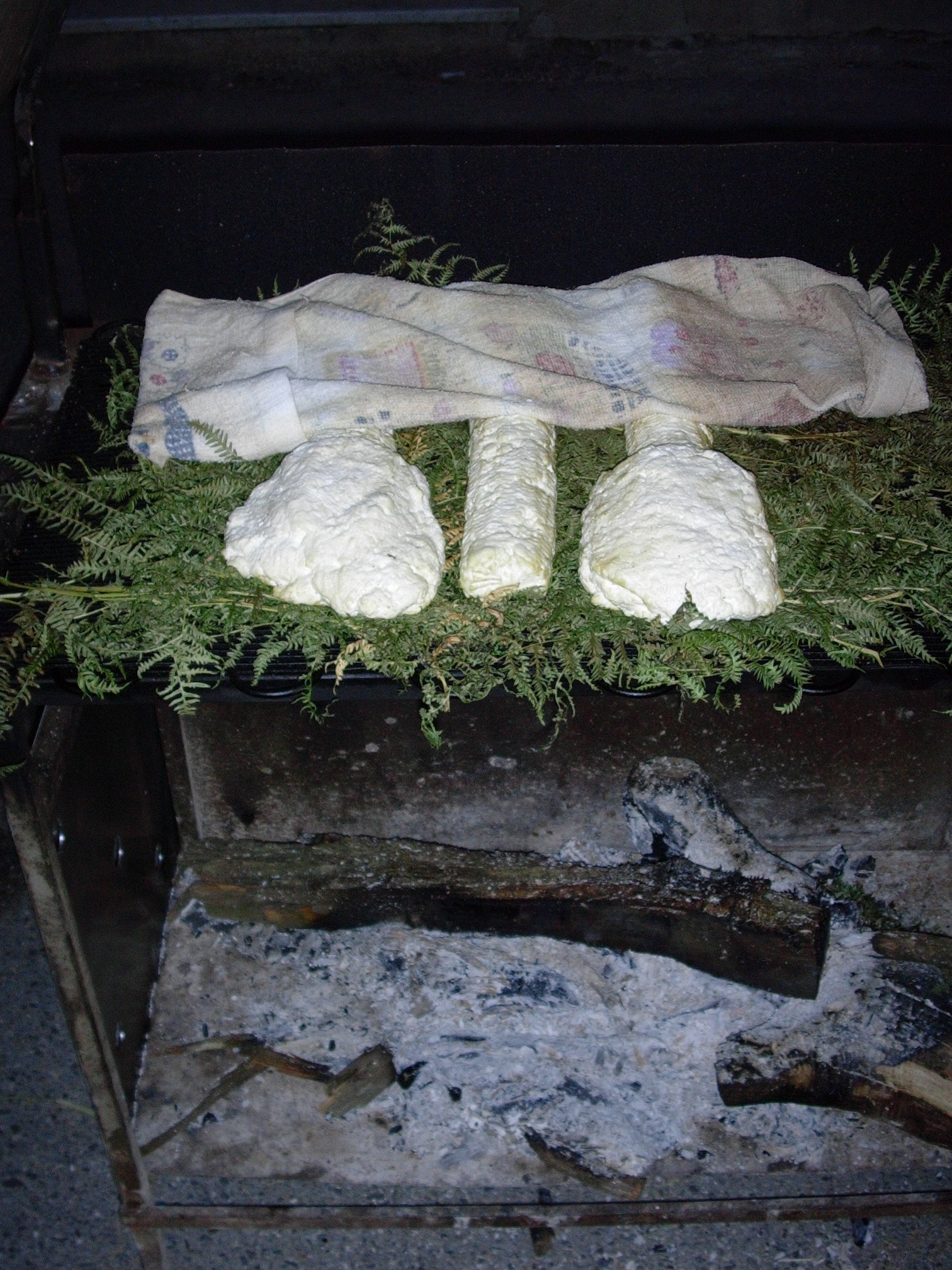 "Autorizzazione OTRS # 2008022710009155 Autore: Gino Larosa "